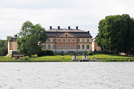 Åkerö slott i Bettna socken, Flens kommun, Södermanland